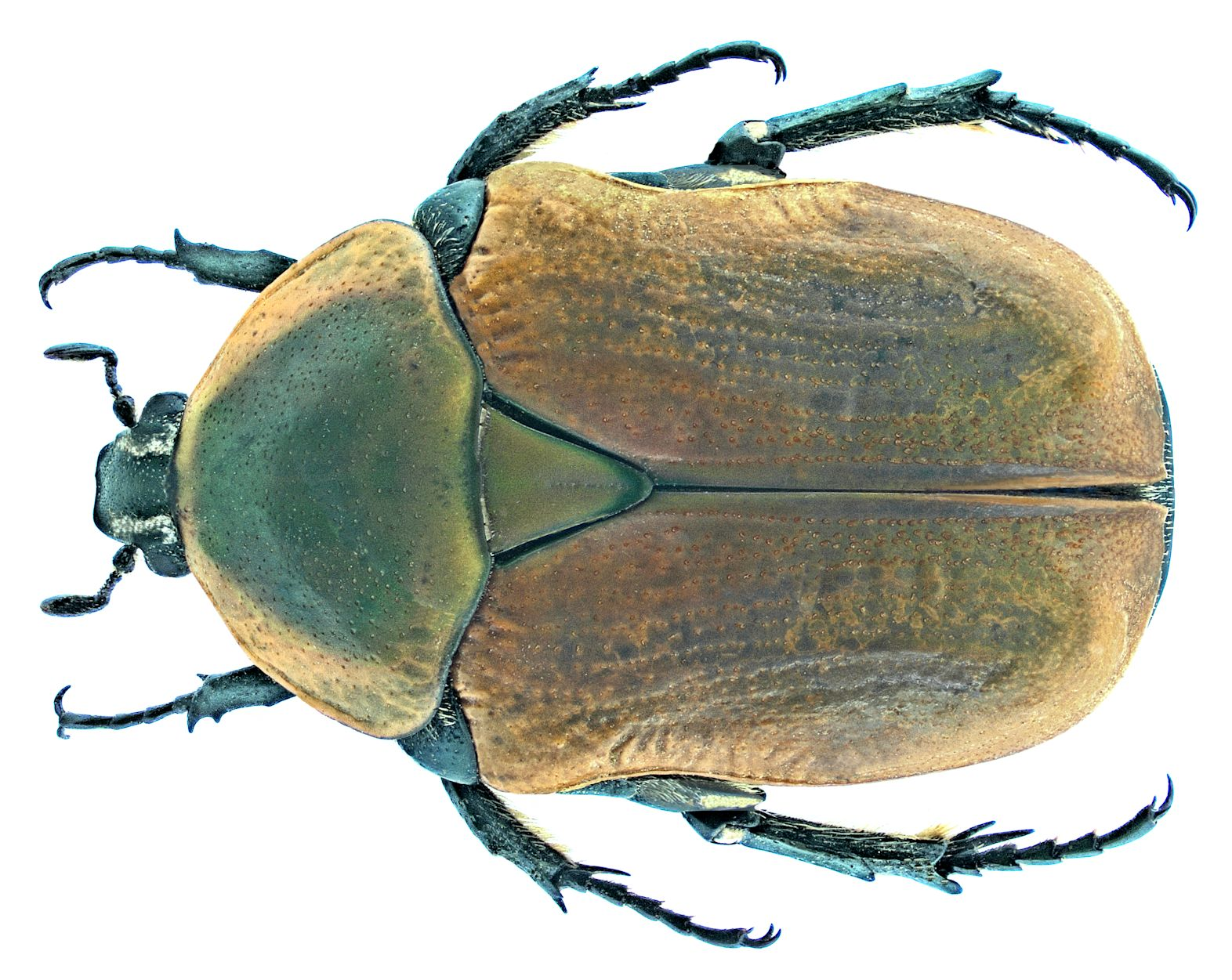 Familie: Scarabaeidae Groesse: 23 mm Verbreitung: südliches Afrika Fundort: Namibia, Etoscha National Park, 1400 m leg.det. U.Schmidt, 1994 Photo: U.Schmidt, 2006